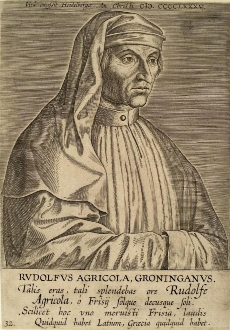 Rudolf Agricola. Heidelberg / Universitätsbibliothek, Inv.Nr./Signatur: Graph. Slg. I.a.4. Kupferstich: 12,2 cm x 17,2 cm Vita excessit Heidelbergæ An. Christi M.CCCCLXXXV. // RUDOLFUS AGRICOLA GRONINGANUS / Talis eras, tali splendebas ore Rudolfe Agricola, o Frisij solque decusque soli./ Scilicet hoc uno meruisti Frisia, laudis / Quidquid habet Latium, Græcia quidquid habet.